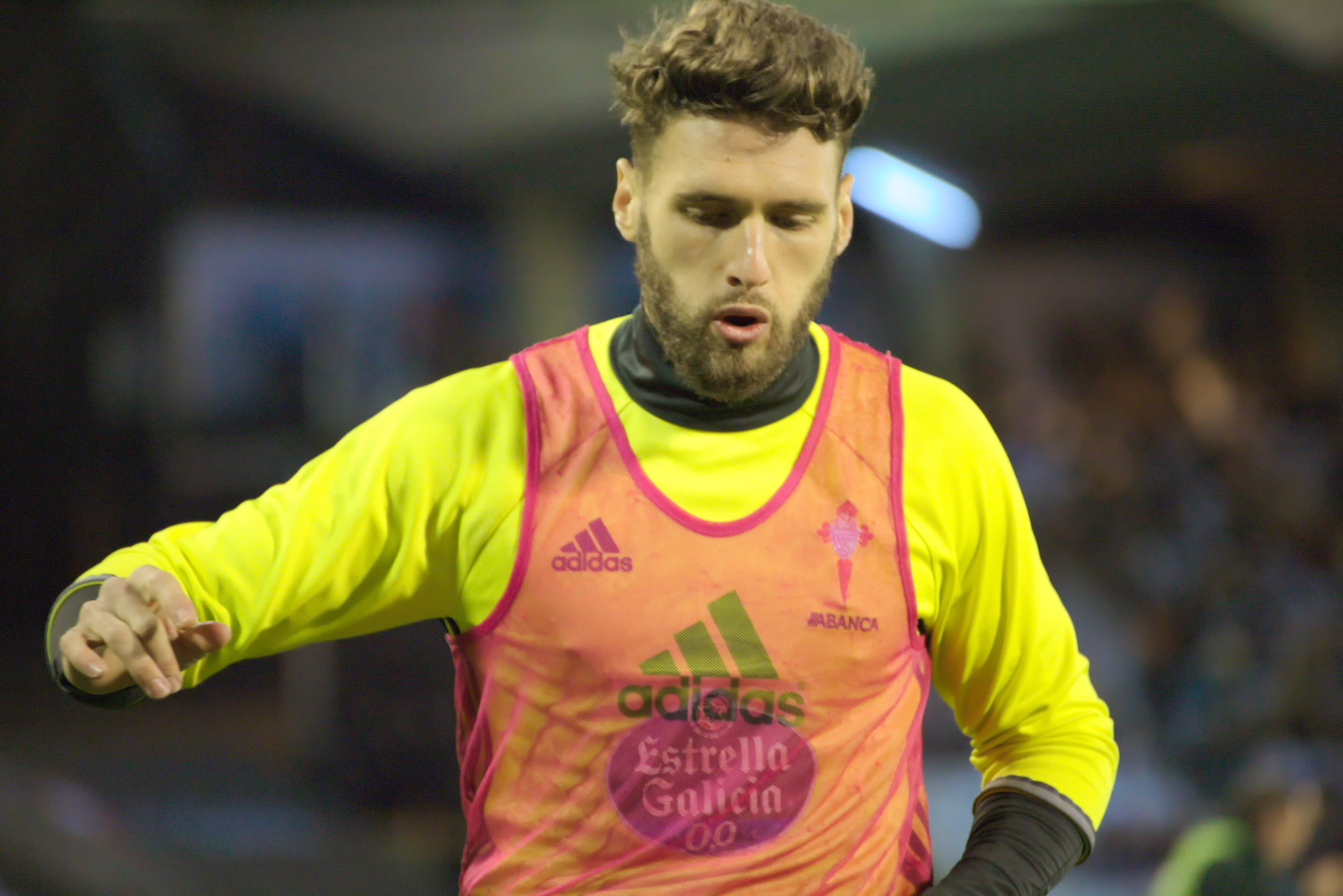 Sergi Gómez - RC Celta de Vigo